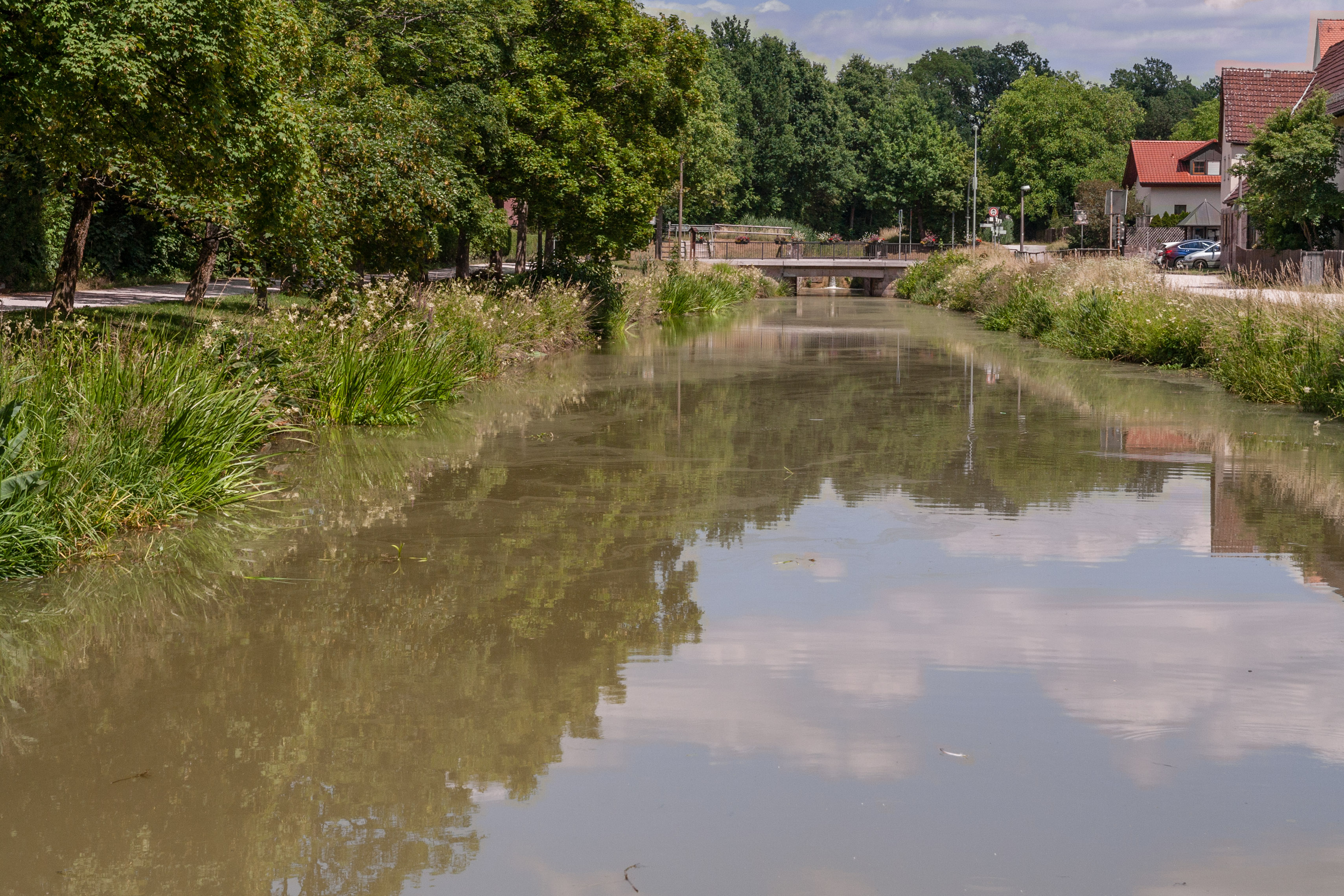 Ludwig-Donau-Main-Kanal, Kanal in Röthenbach bei Sankt Wolfgang